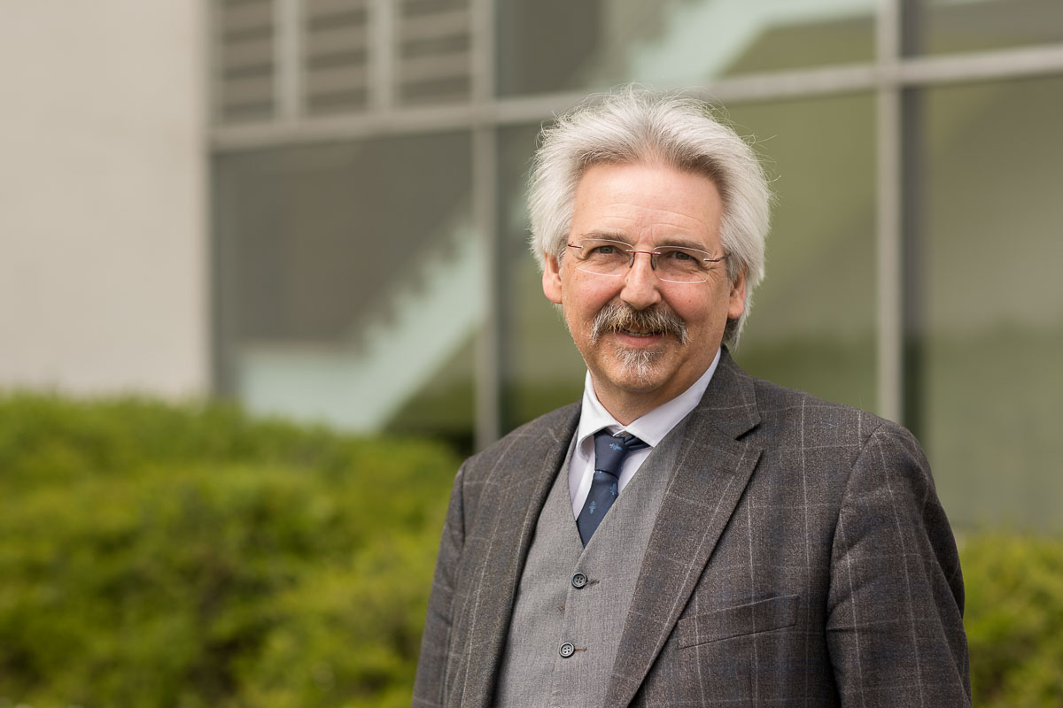 Matthias Theodor Vogt 2016